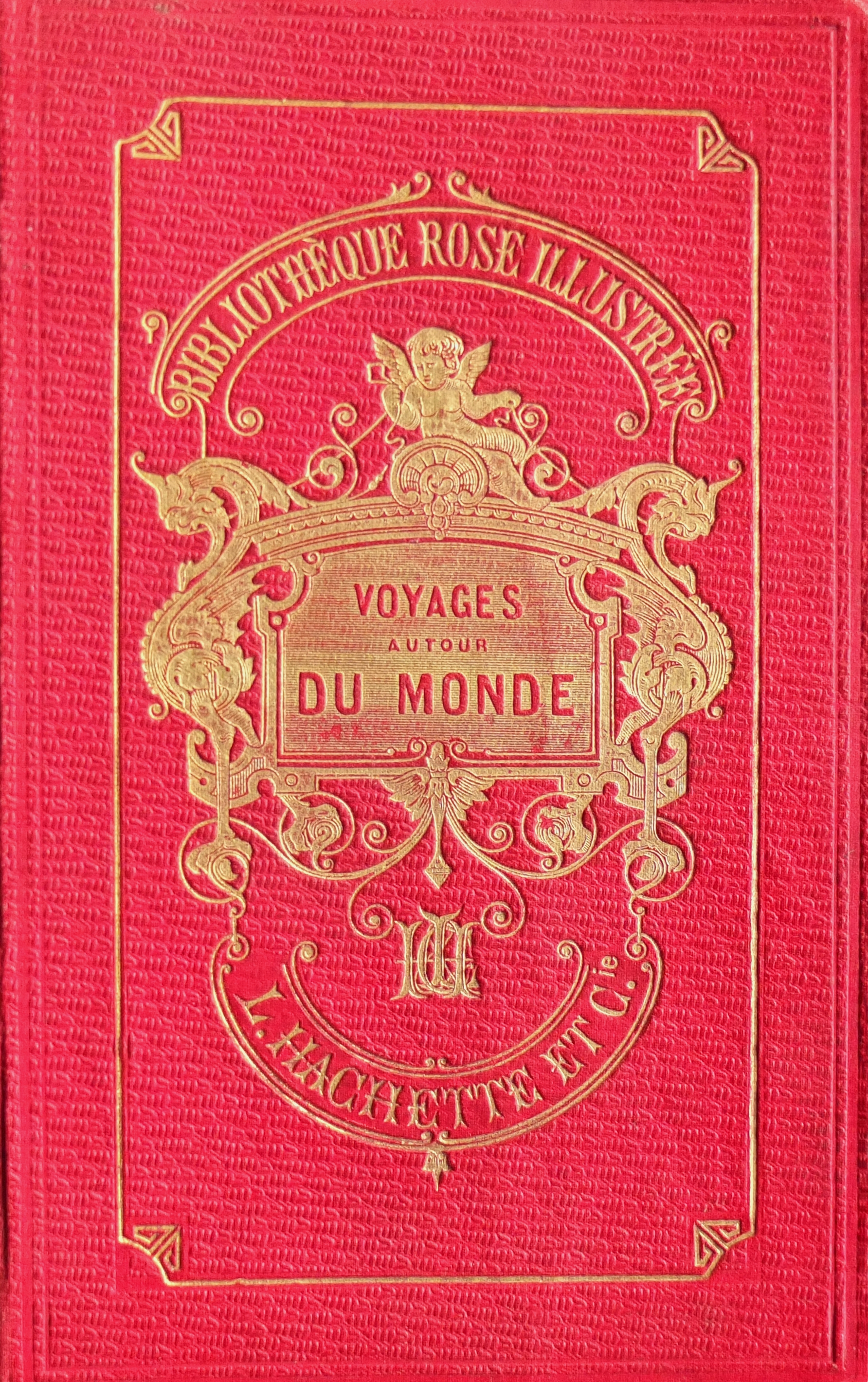 Couverture du volume de la Bibliothèque Rose illustrée : Voyages autour du Monde de Ida Pfeiffer, 1868. Librairie Hachette, Paris.